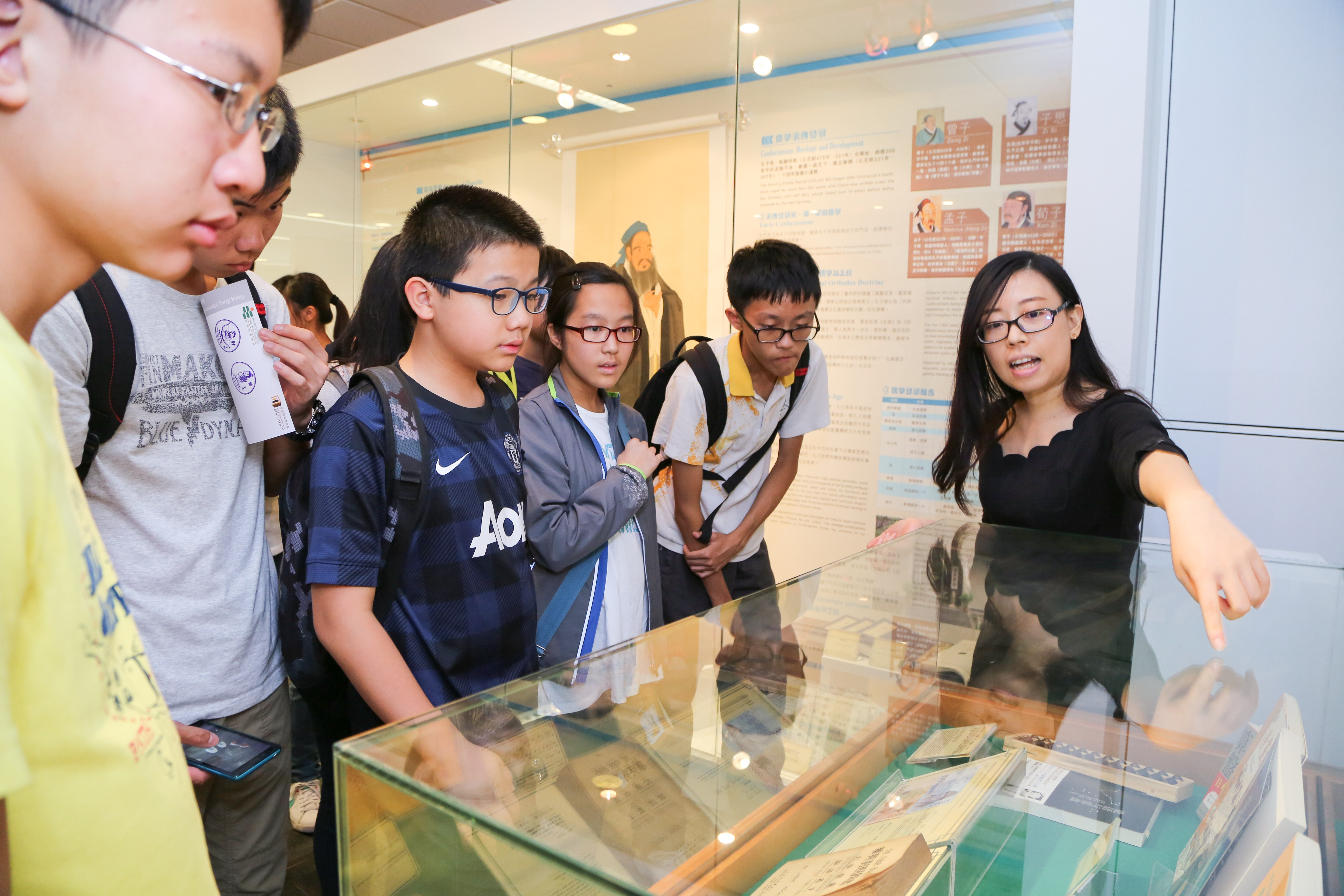 中文（香港）: 導賞員正為學生講解展品的故事